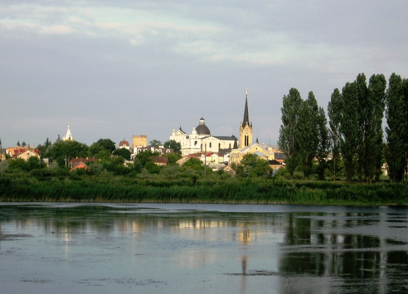 Луцьк старе місто